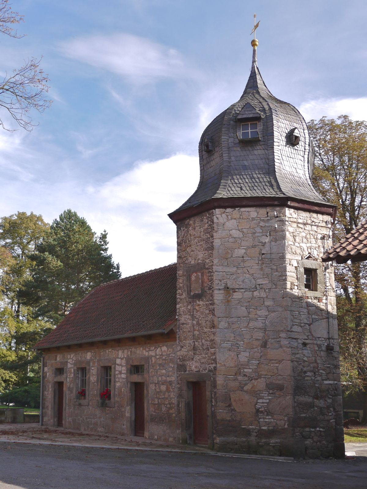 Barocker Taubenturm auf dem ehemaligen Klosterhof in Salzgitter-Ringelheim